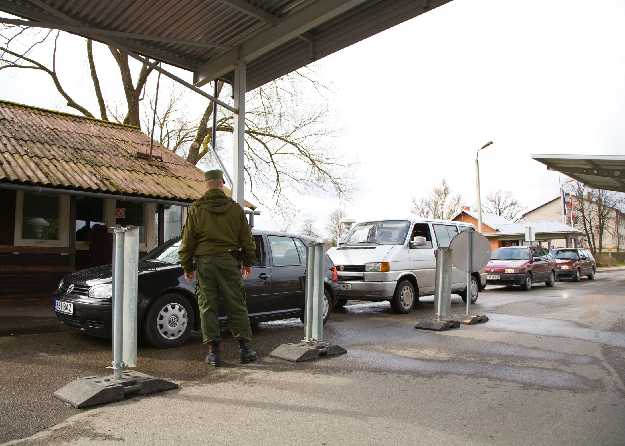 On võimalik, et Eesti või mõni teine Schengeniga ühinenud liikmesriik taastab ajutiselt piirikontrolli sisepiiridel. Esimest korda taastas Eesti piirikontrolli sisepiiridel 17.--23. aprillil 2010 seoses NATO välisministrite tippkohtumisega.